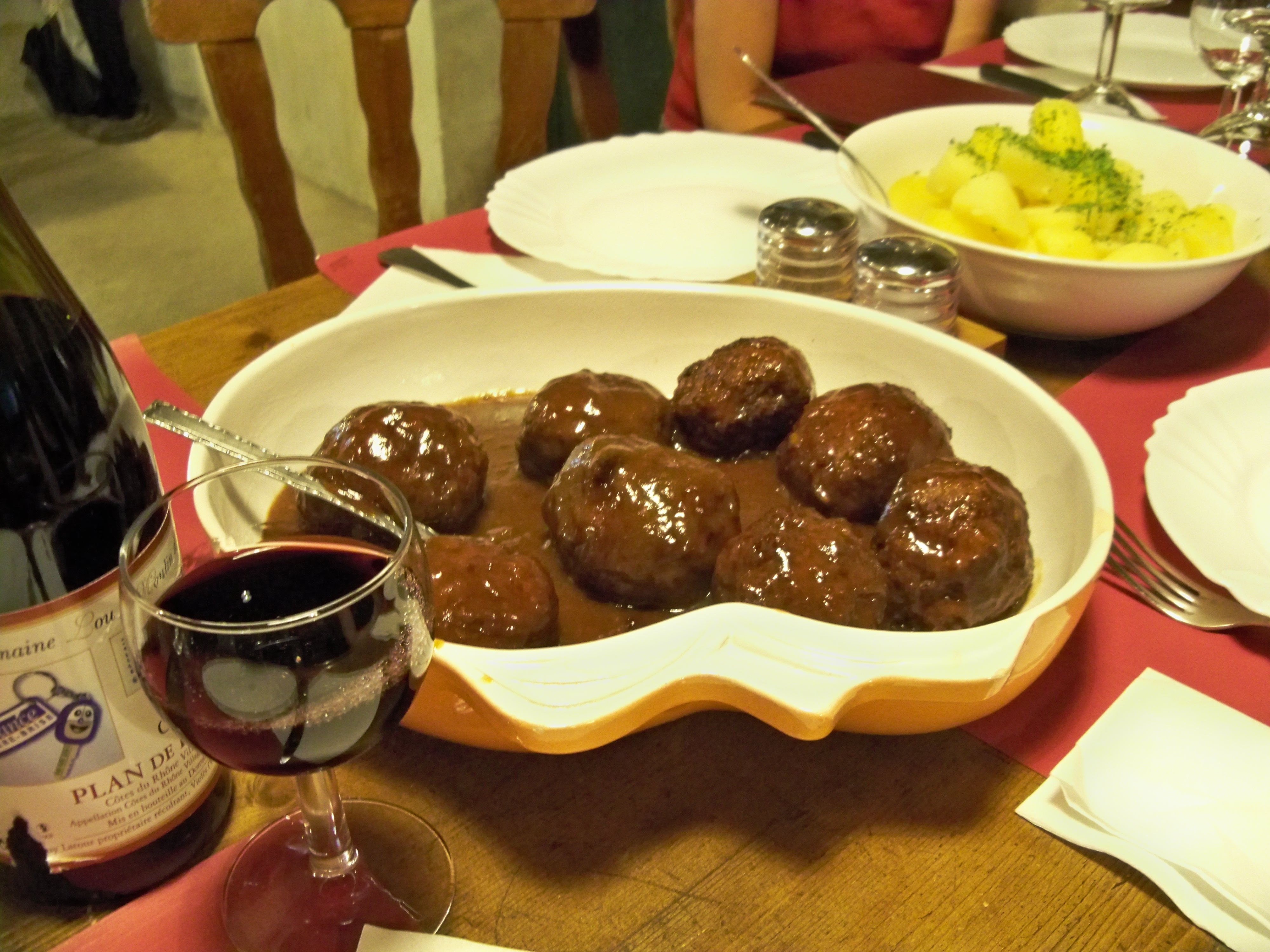 plat de boulets à la liégeoise au musée de la Gourmandise de Hermalle-sous-Huy